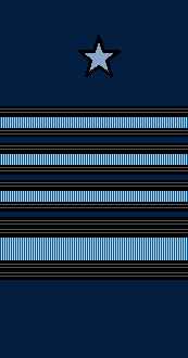 Bocamanga